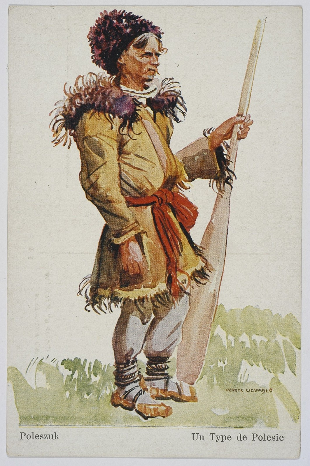 Г. Узембло. Полищук. 1939